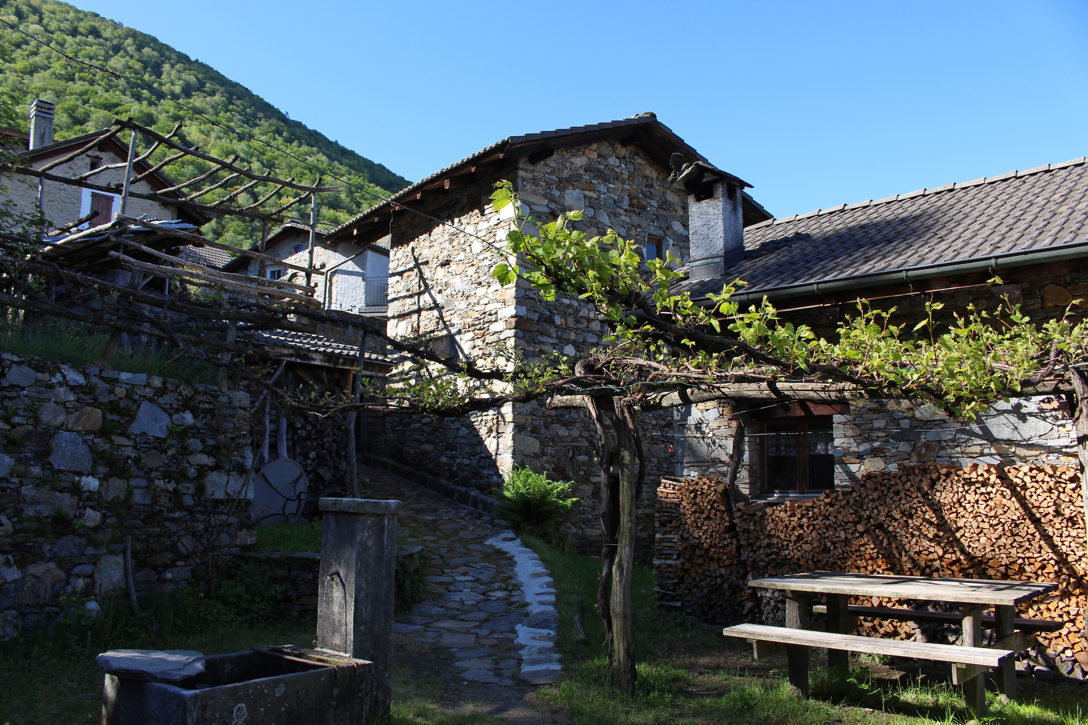 Im Bergweiler Monti di Caviano (695 m.ü.M.) oberhalb von Caviano am Lago Maggiore im Schweizer Südkanton Ticino.